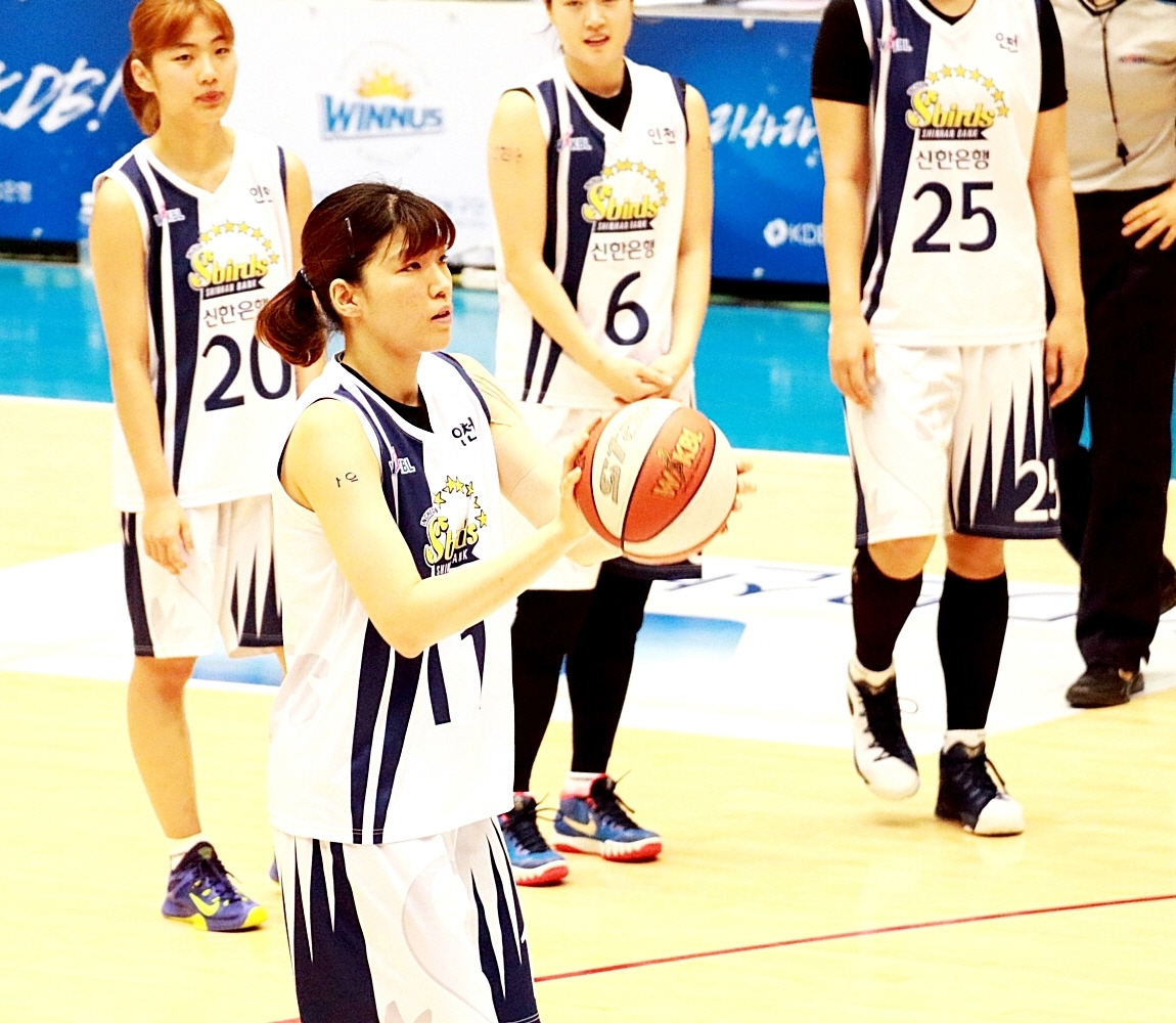 160205 여자농구 KDB생명 vs 신한은행 퓨처스